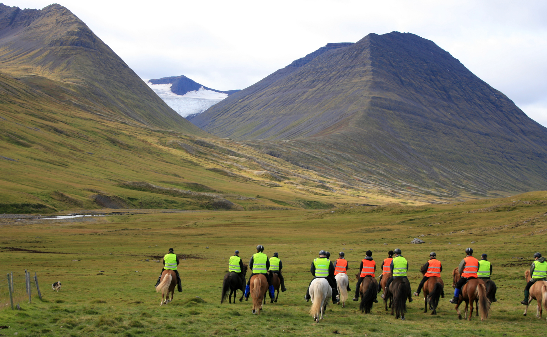 Gangnamenn í Sveinsstaðaafrétt í 1. göngum 2008